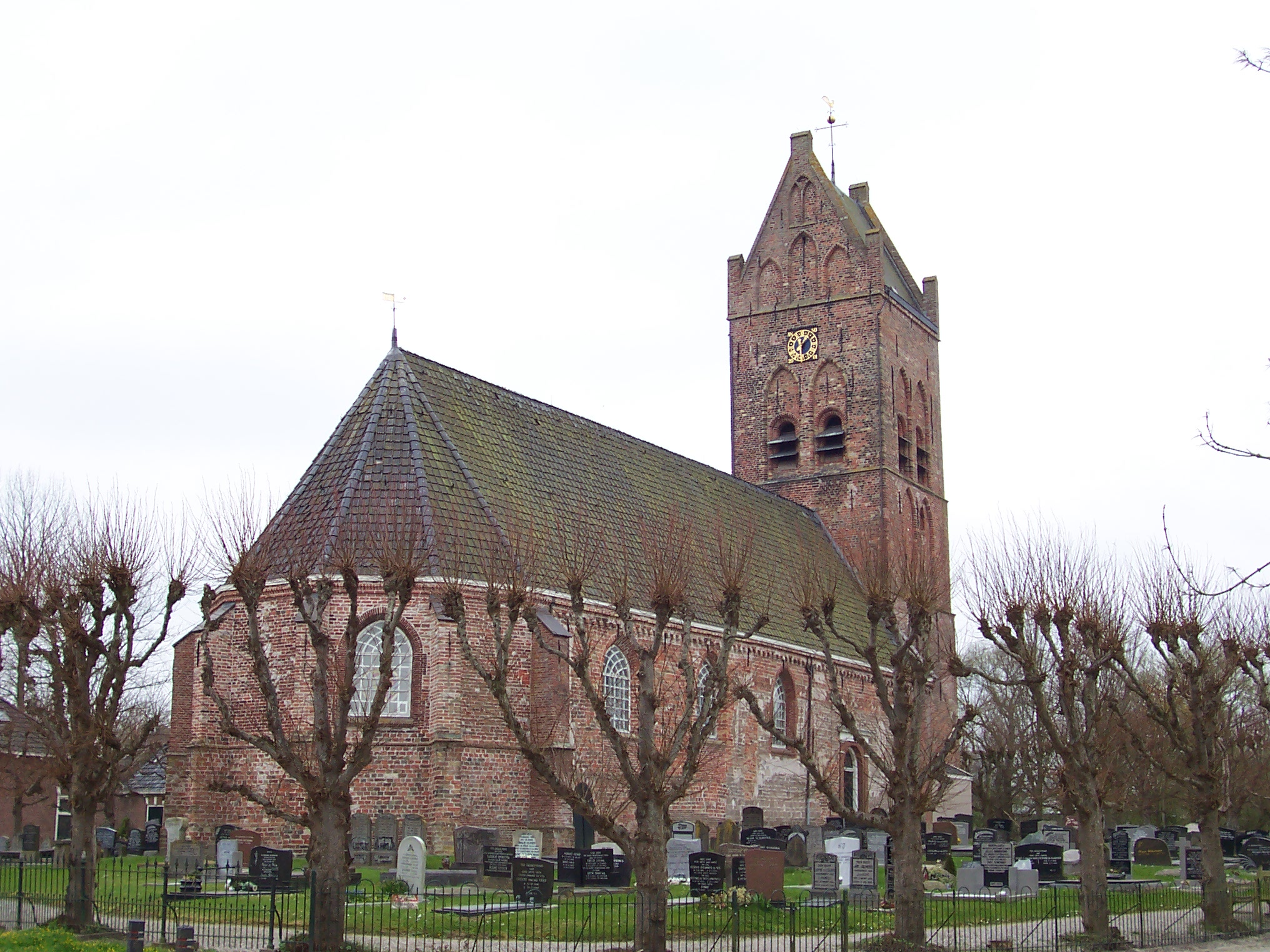 Goutum, Agnestsjerke